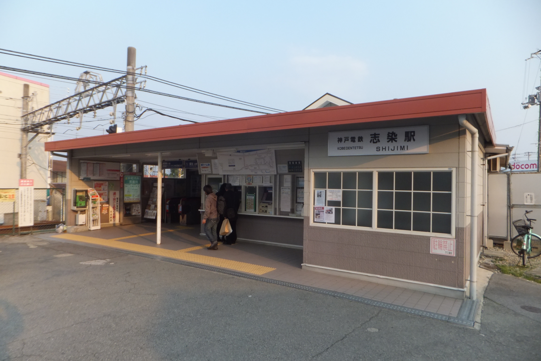 神戸電鉄粟生線志染駅